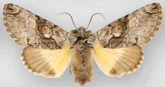 Charadra tapa female